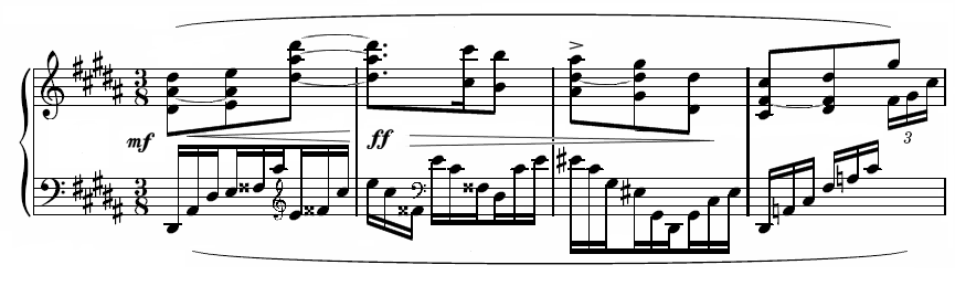 Ravel's Gaspard de la Nuit, Scarbo, bars 110 - 113